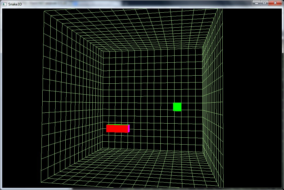 Змейка в 3D